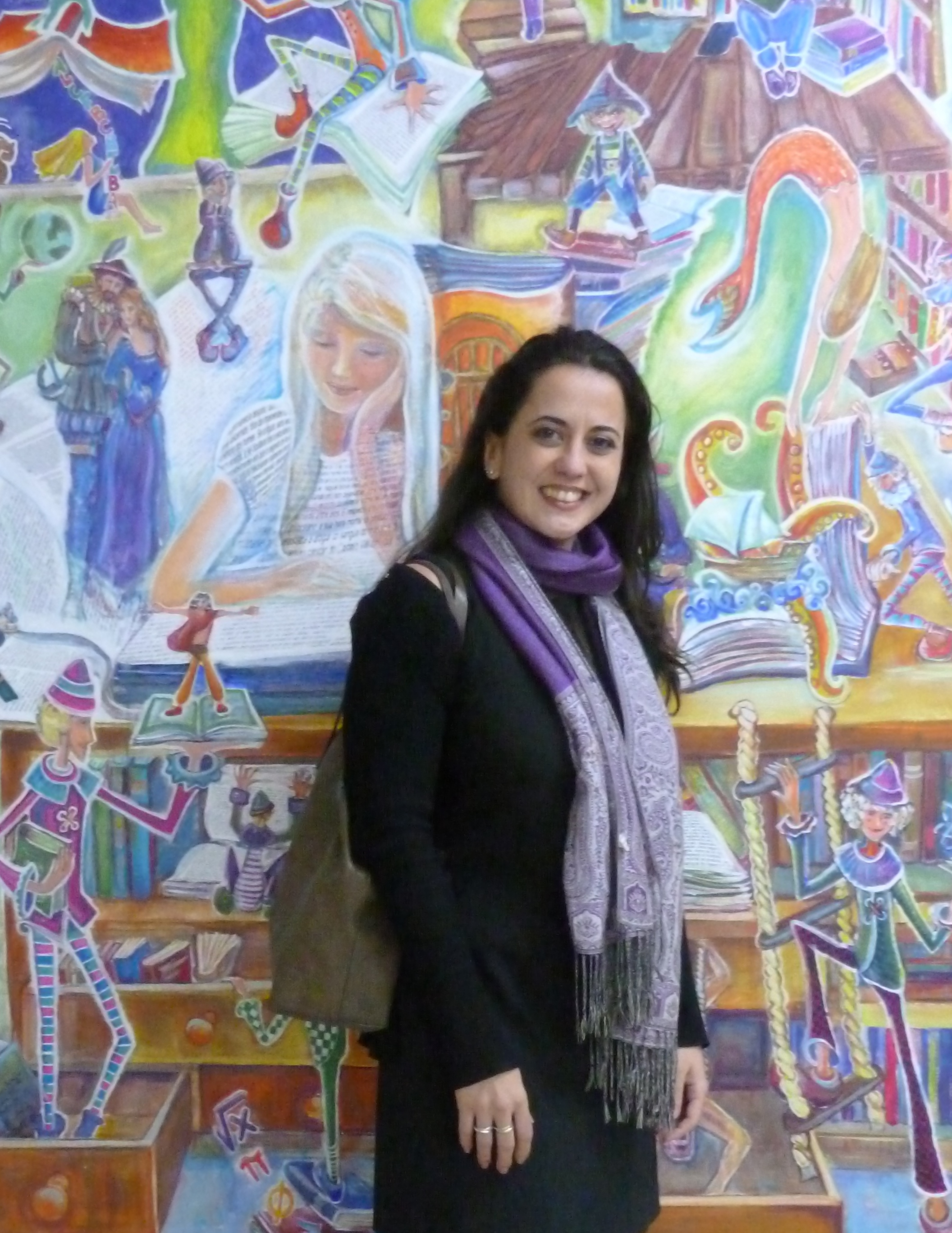 Sabela Hermida Mondelo